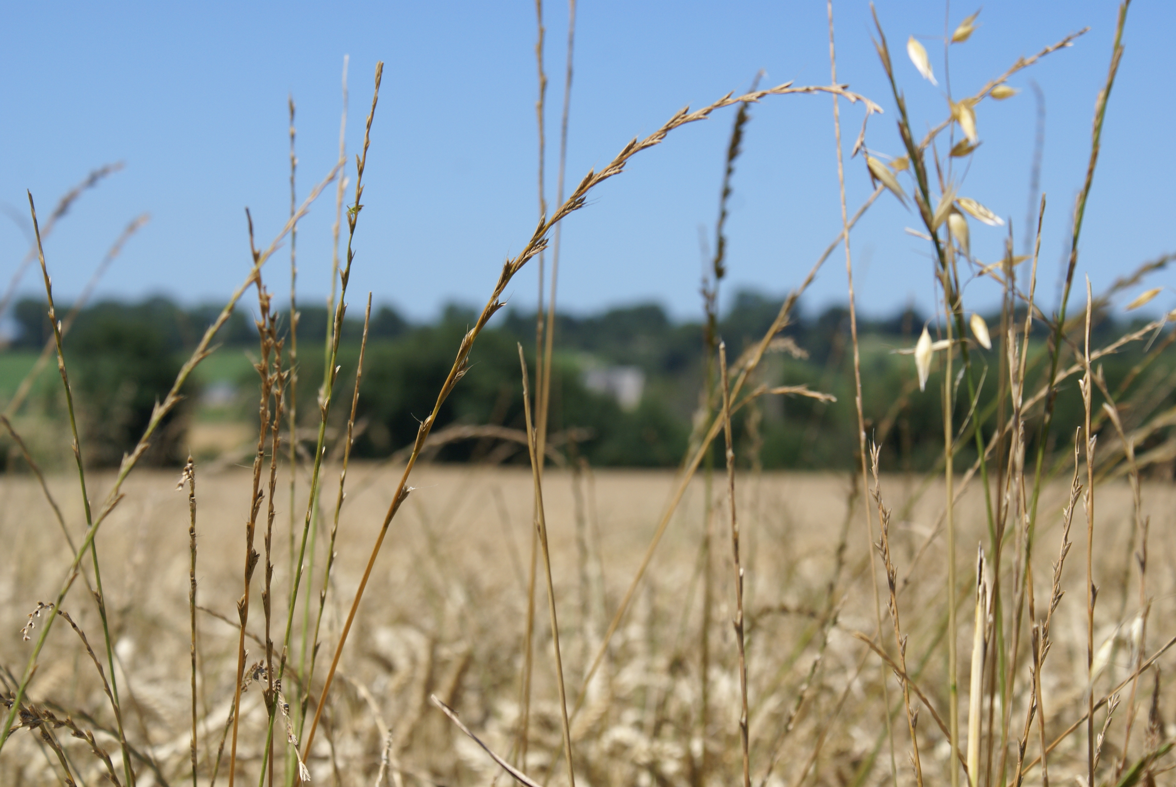 Akker in Frankrijk met scherptediepteverschil